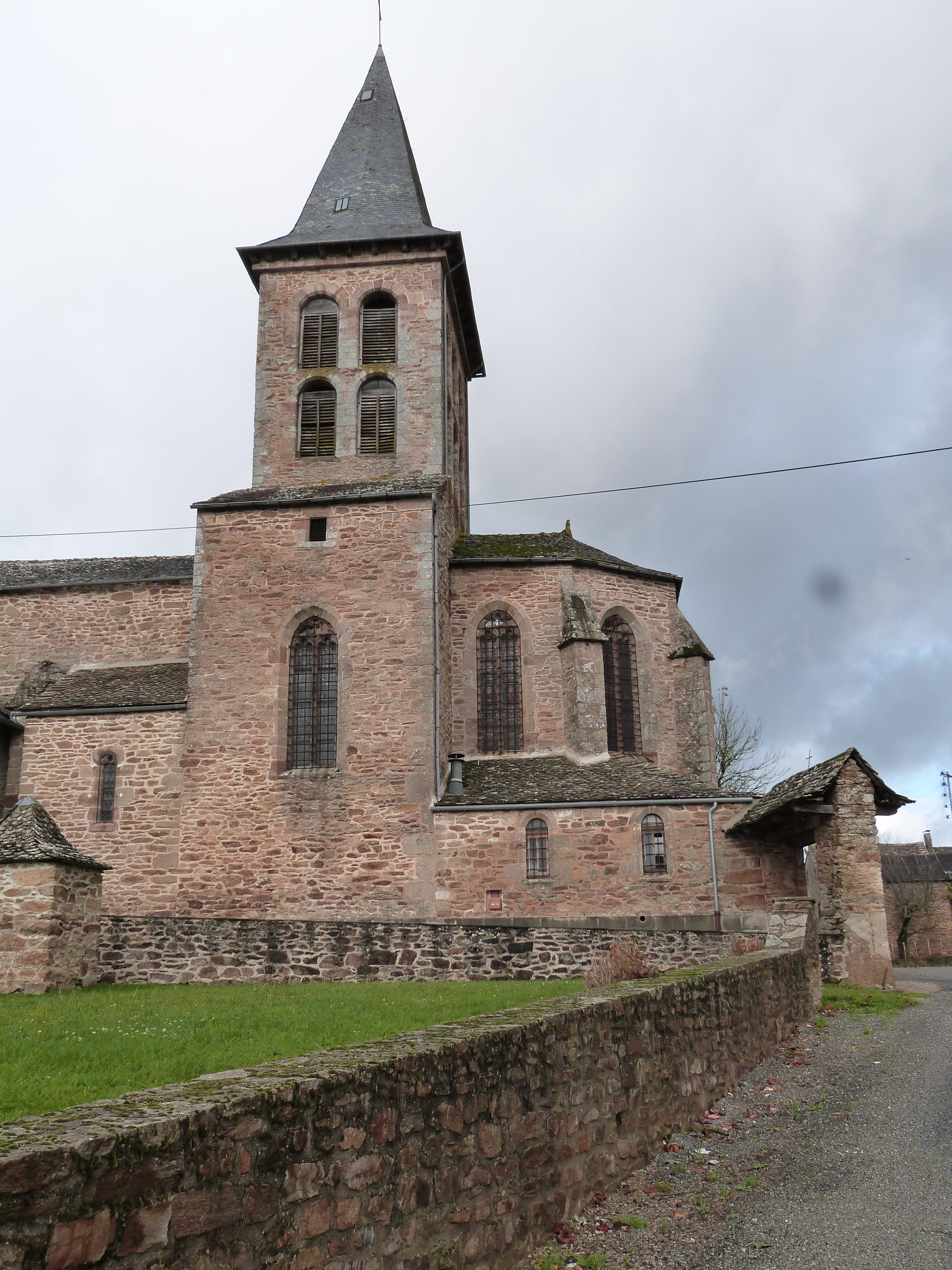 Eglise du hameau de Naves (Manhac)